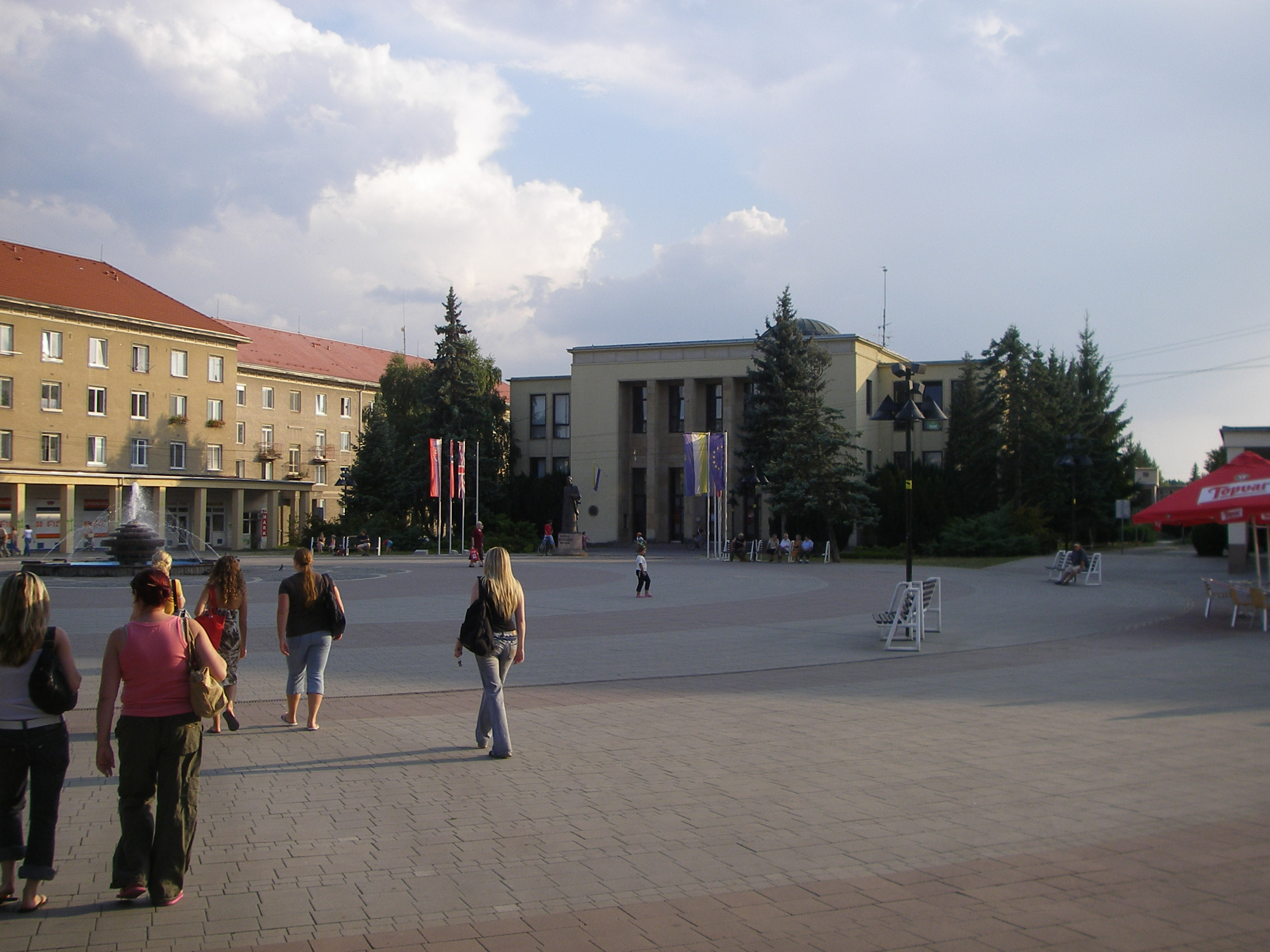 Námestie Matice slovenskej